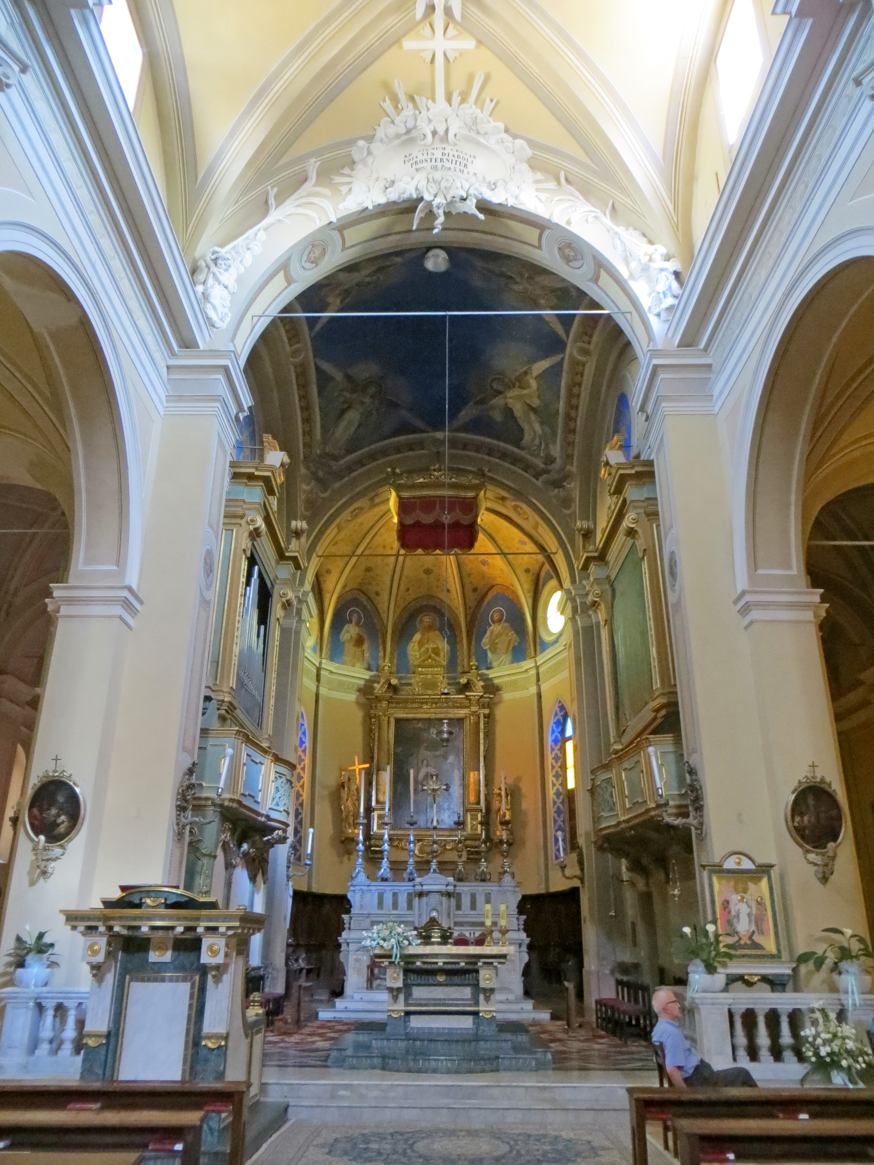 Duomo di Santa Margherita (Colorno) - presbiterio